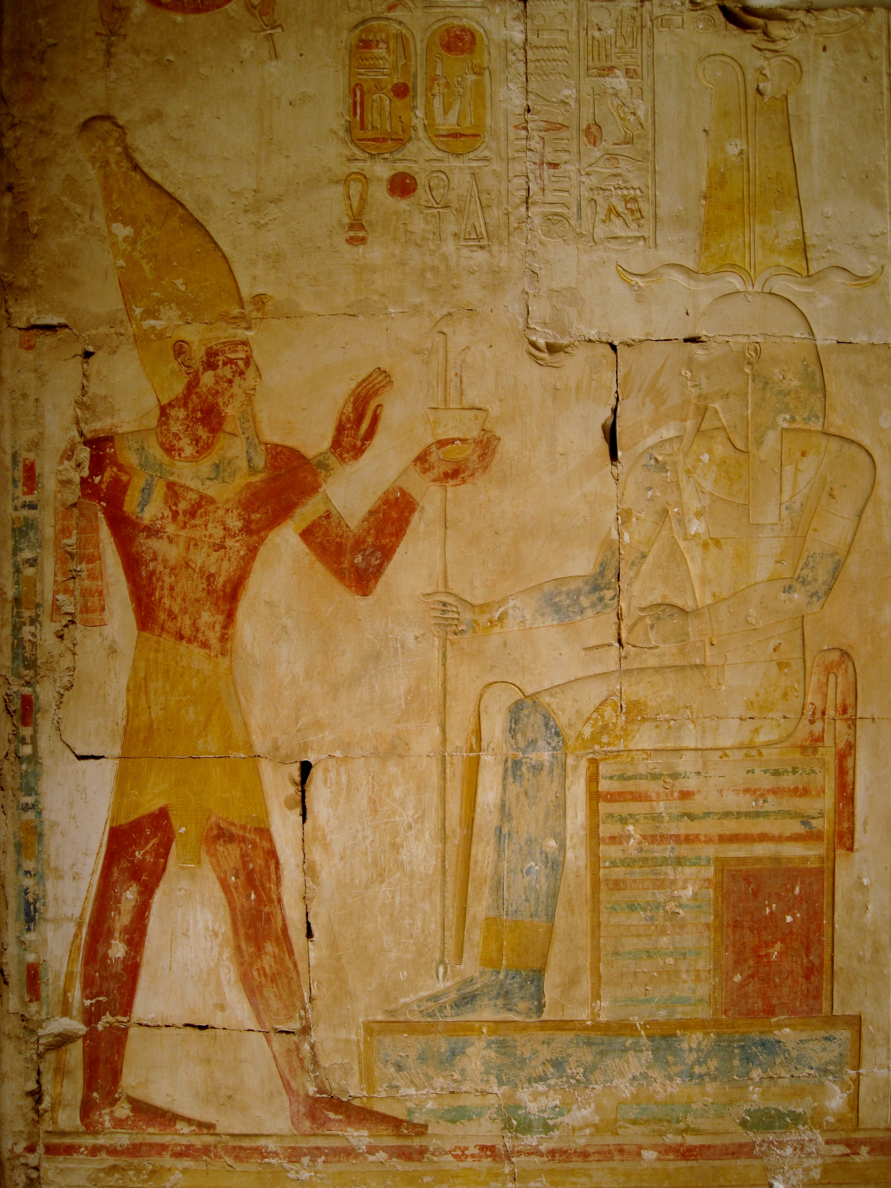 Relief im Tempel Ramses II. in Abydos, Ägypten